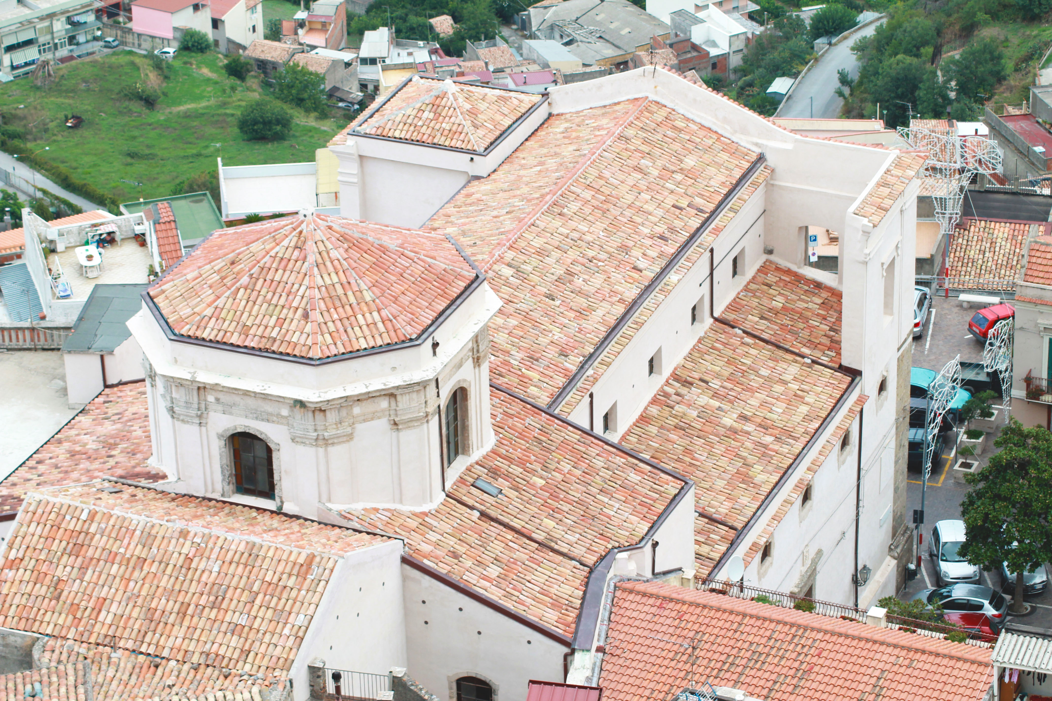 Cattedrale vista dall'alto santa lucia del mela